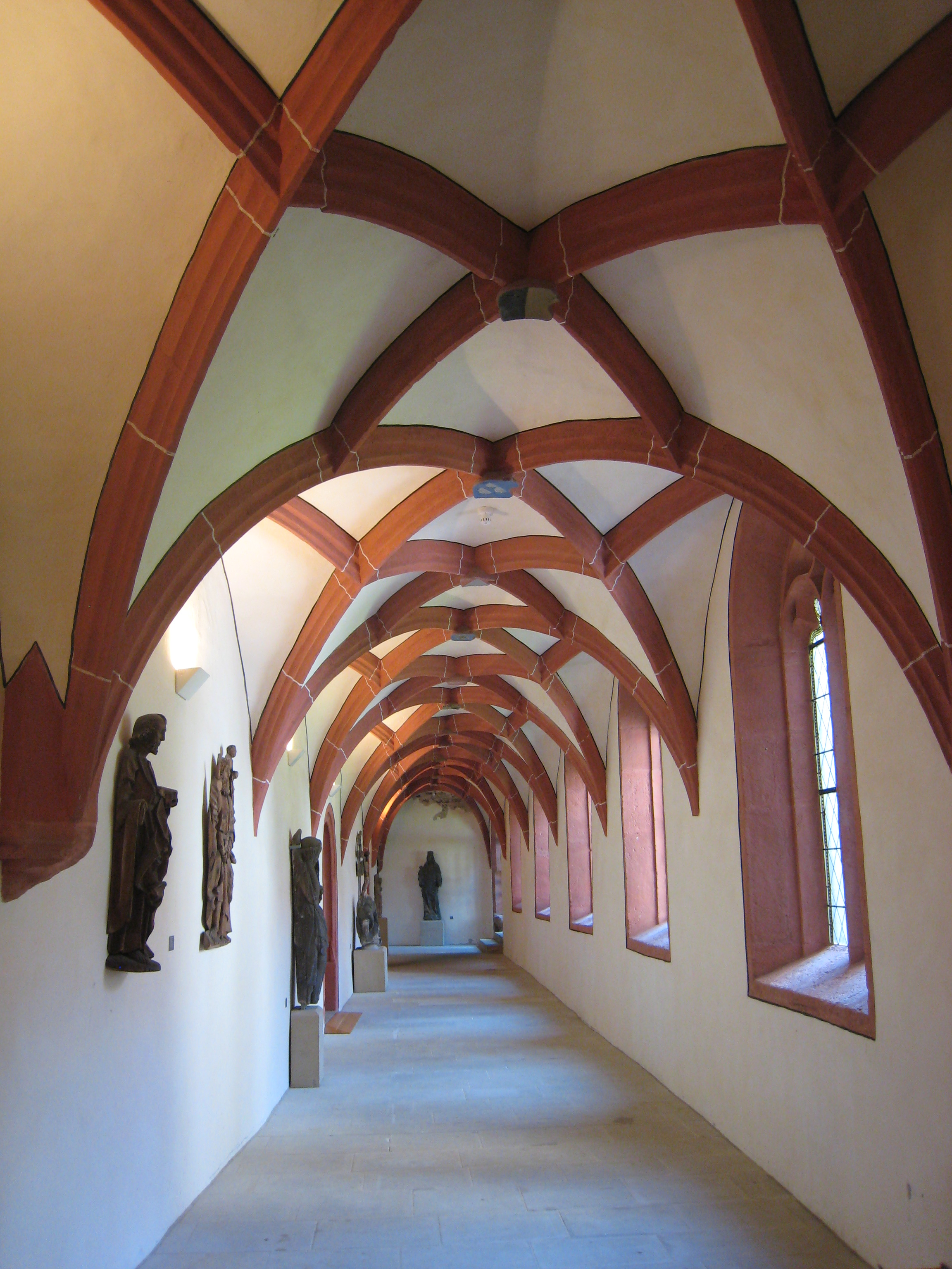 Kreuzgang des ehemaligen Franziskanerklosters in Saalfeld